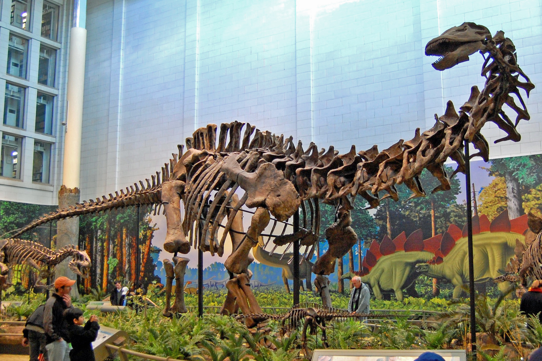 Apatosaurus louisae, Carnegie Museum.